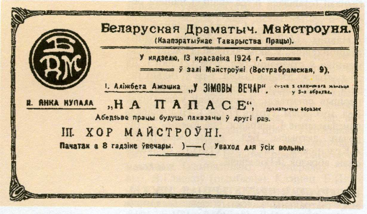 Беларуская (тарашкевіца): Афіша Беларускай драматычнай майстроўні за 13 красавіка 1924 году